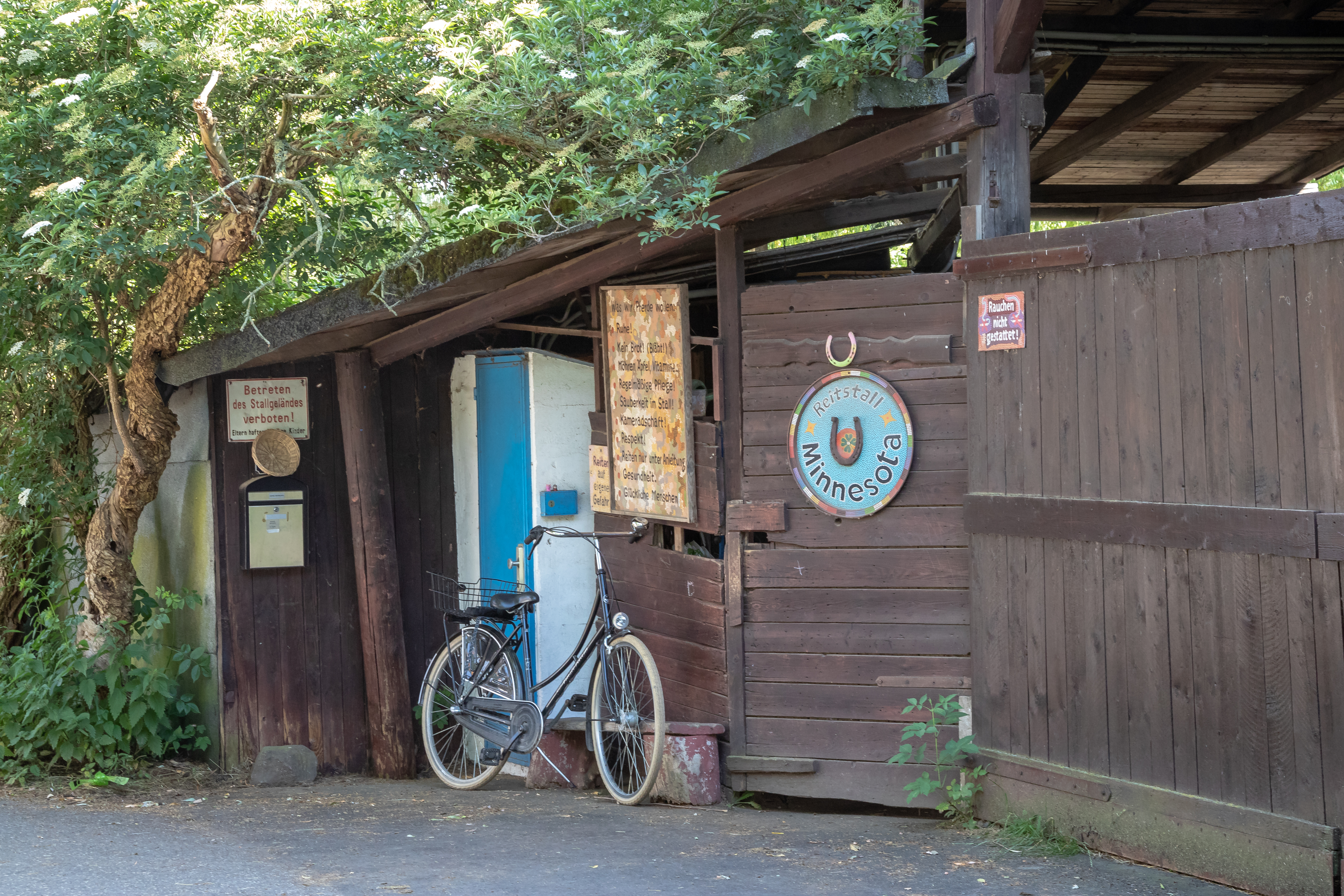 Indianersiedlung Zollstock in Köln; Reitstall Minnesota